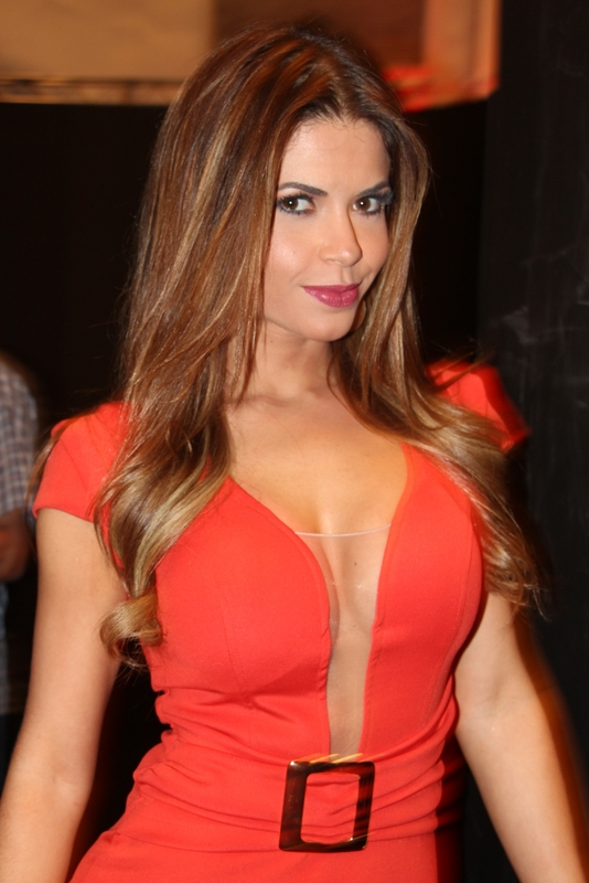 Cacau Colucci-001